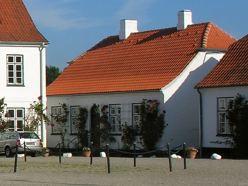 Kulturdenkmal 4.8 altes Waschhaus von Schloss Glücksburg Schleswig-Holstein Foto 2012 Wolfgang Pehlemann Steinberg/Ostsee DSCN0212